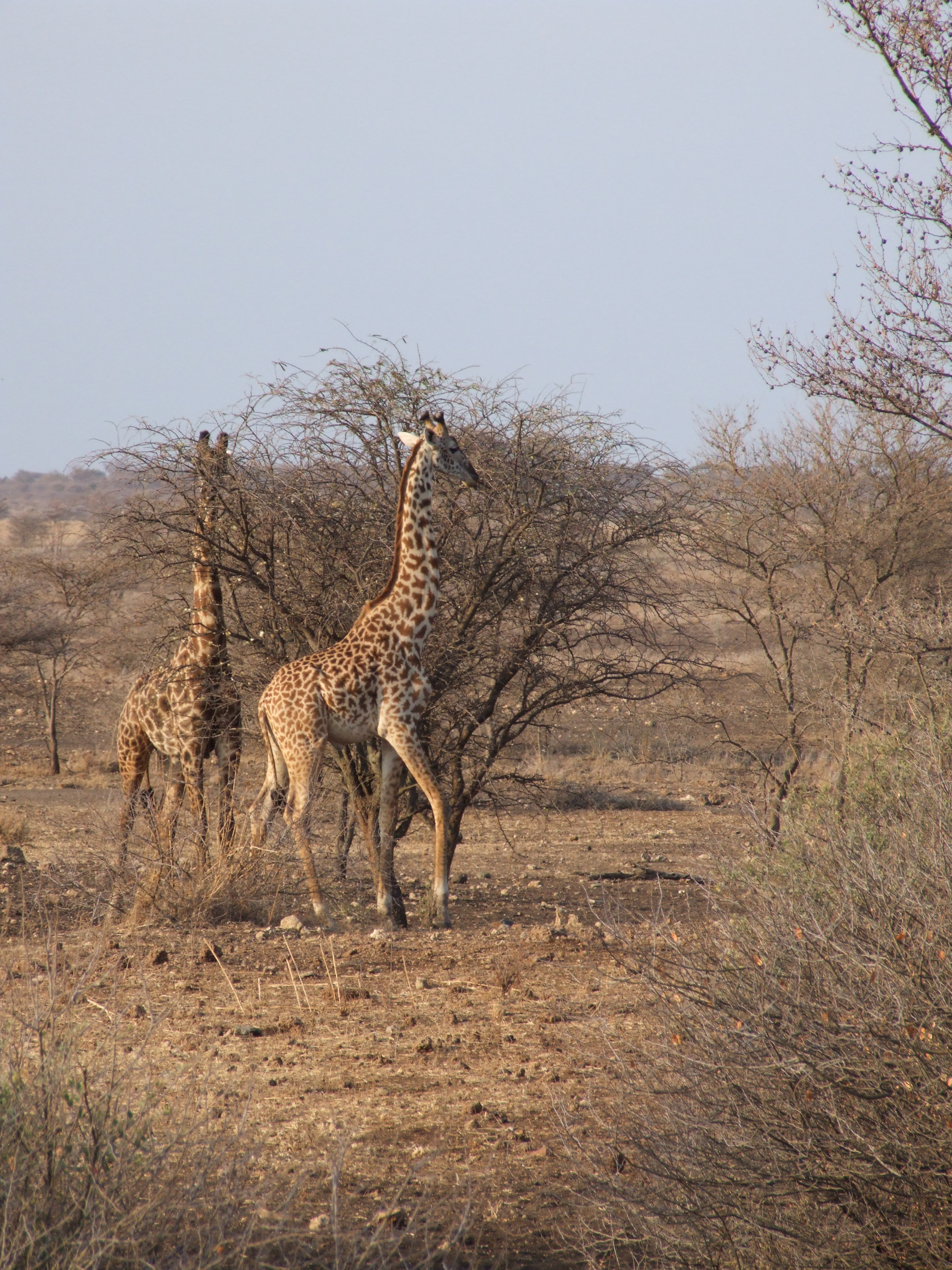 Maasai-Giraffen in Tansania